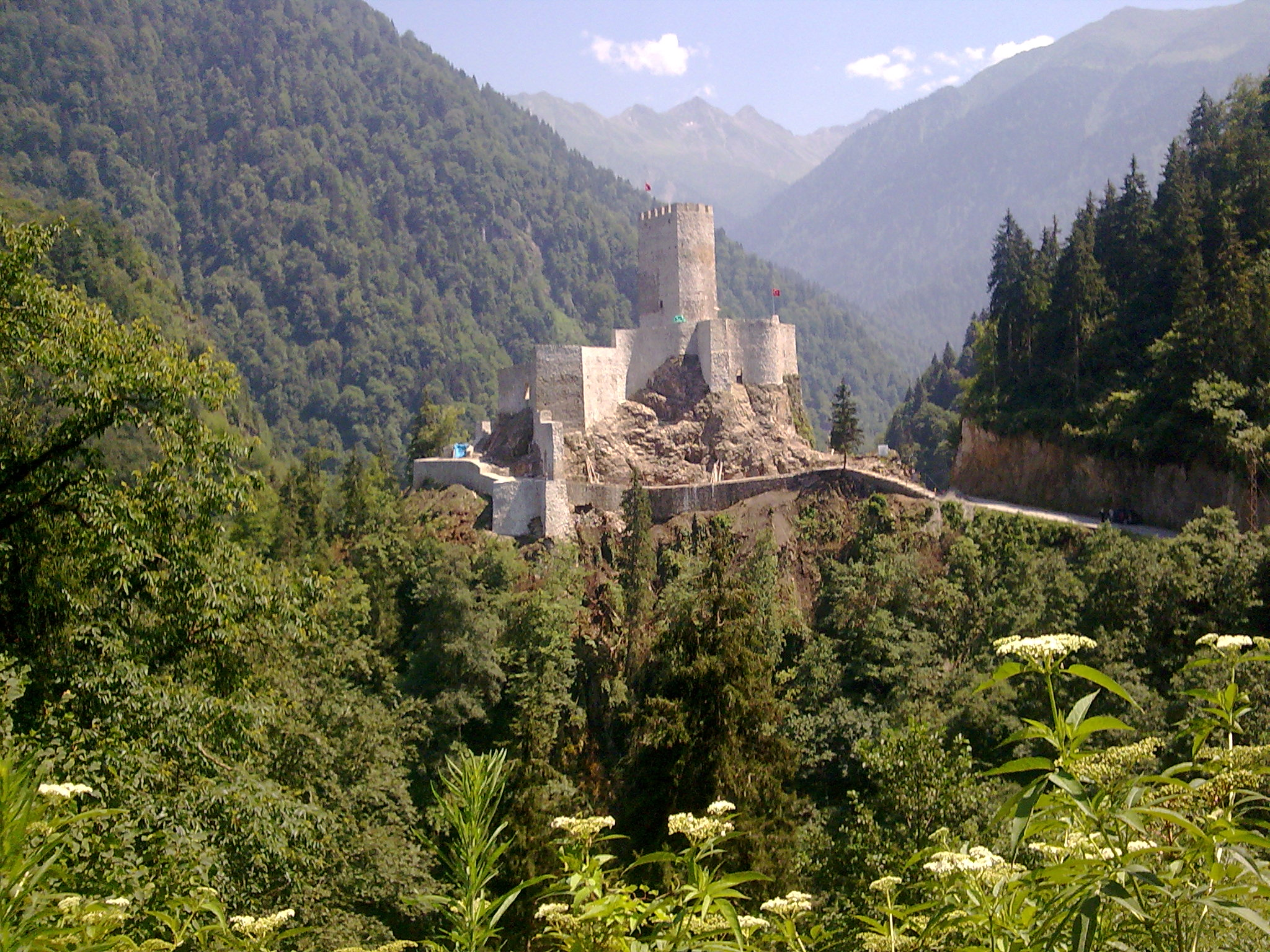 Rize'nin Çamlıhemşin ilçesinde bulunan Zil Kalesi.